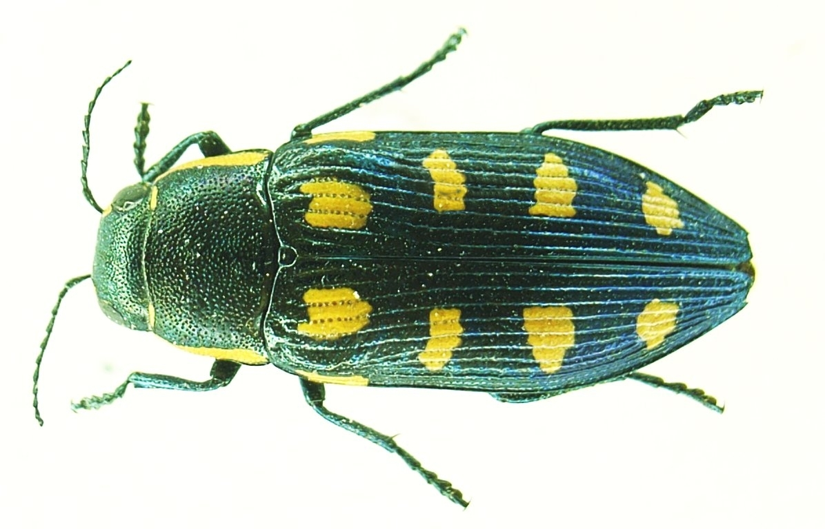 Buprestis octopunctata